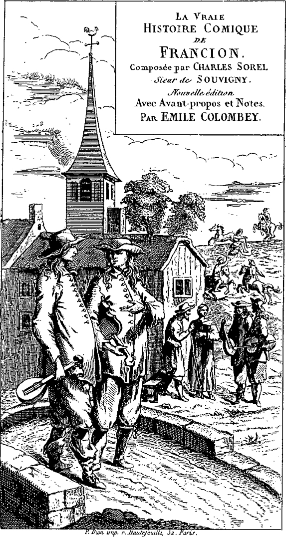 Frontispiece of Charles Sorel (1597-1674)'s La vraie histoire comique de Francion 1858 edition by Émile Colombey